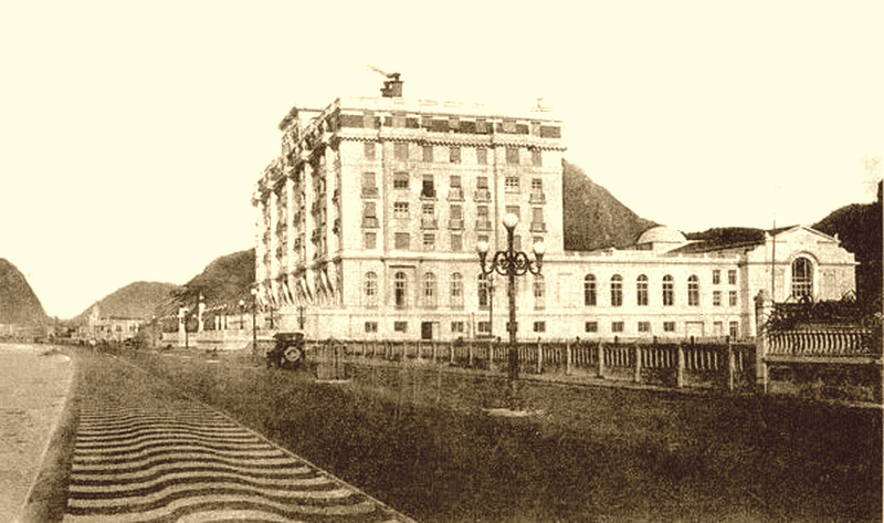 Vista do hotel Copacabana Palace, Rio de Janeiro, Brasil, 1923